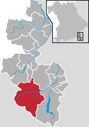 Karte von Ramsau b. Berchtesgaden